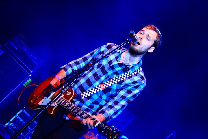 Seltzer en vivo en el Escena Monterrey en Octubre de 2010